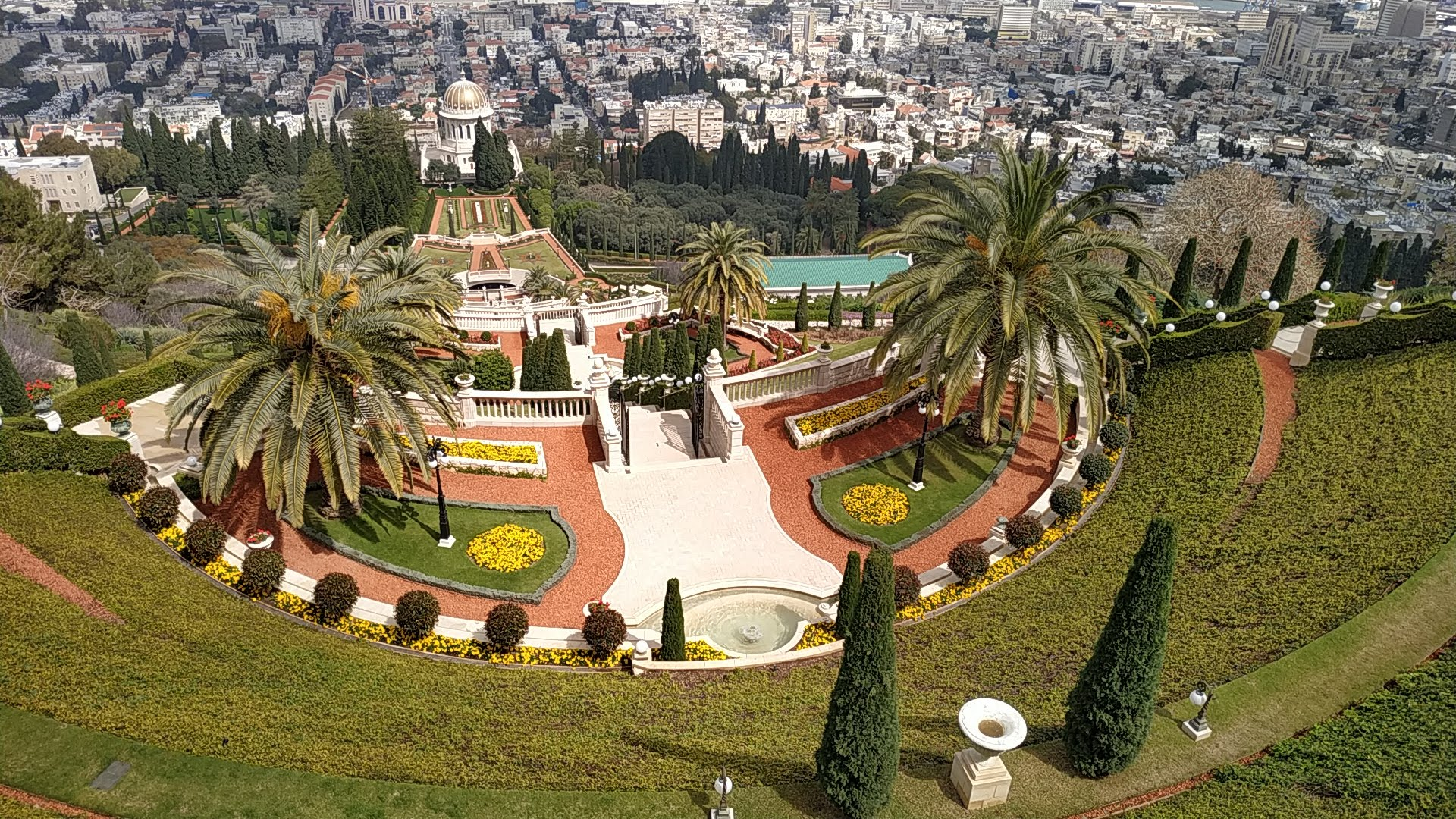 Terrasların ümümi görünüşü